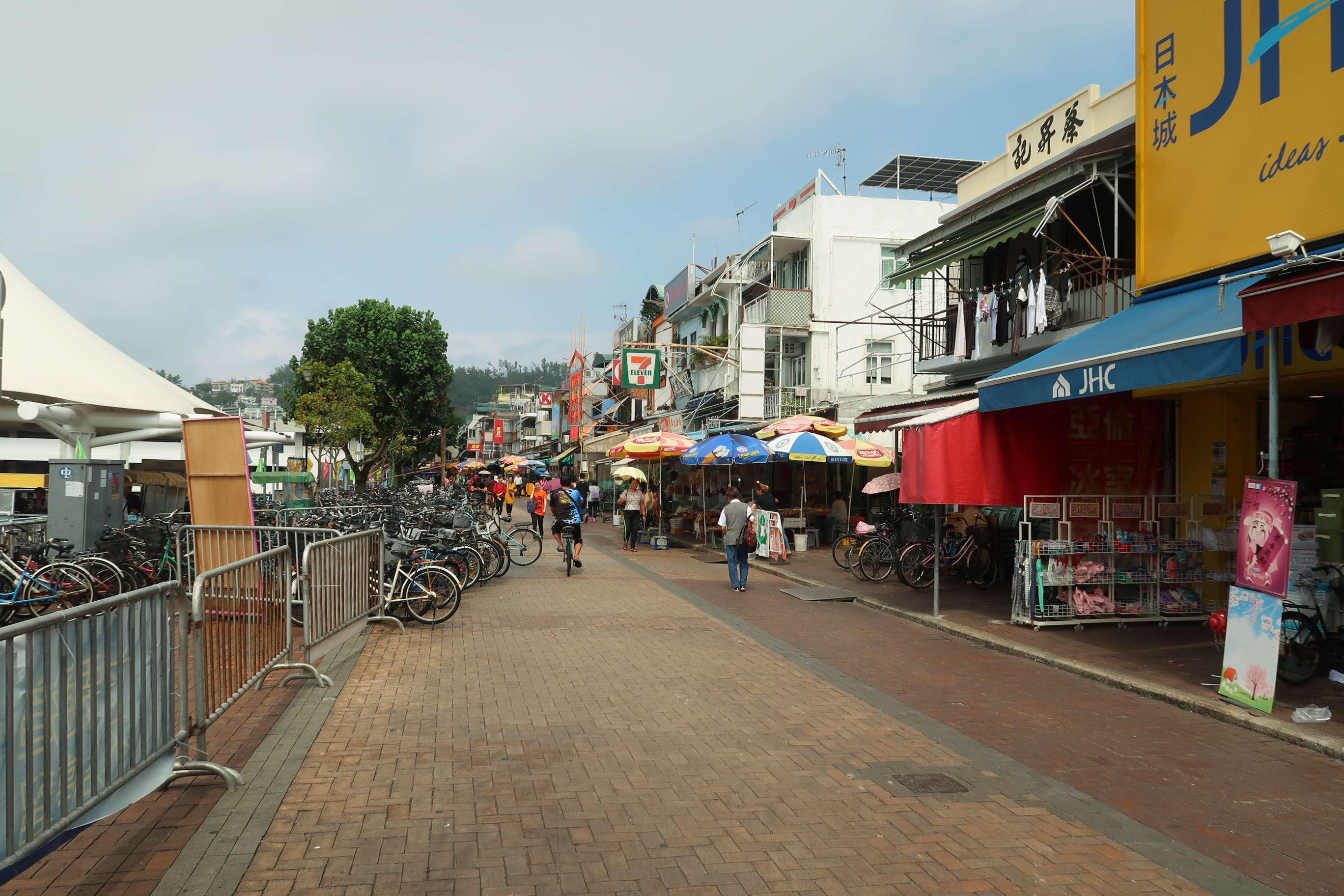 San Hing Praya Road 新興海傍街